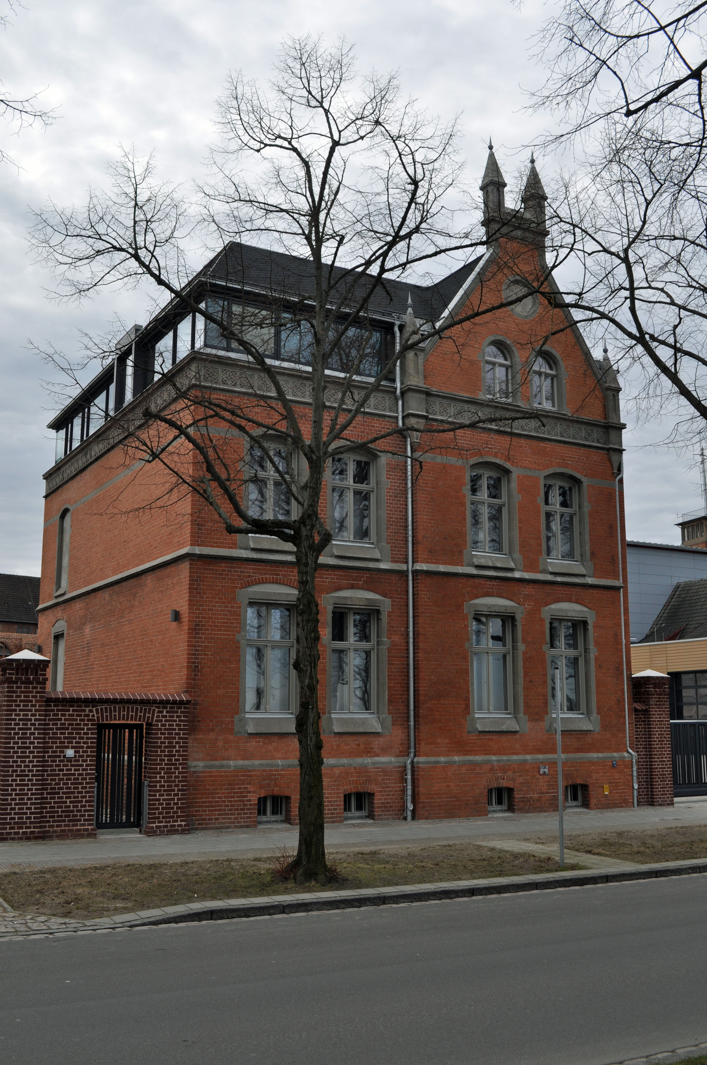 Gebäude bzw. Gebäudedetail in Stralsund. Straße und Hausnummer siehe Dateiname.